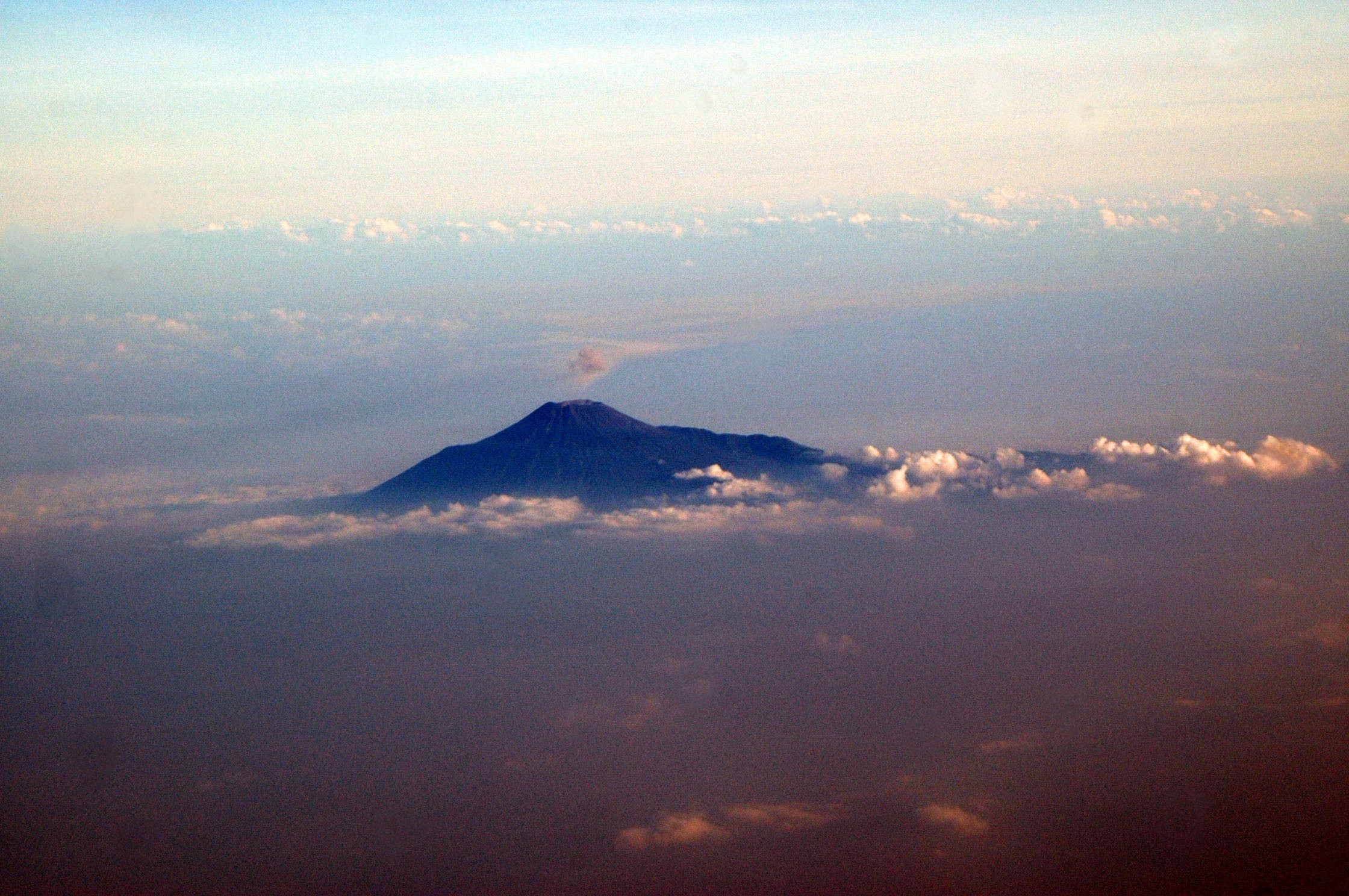 Vue du sommet du volcan au-dessus des nuages.